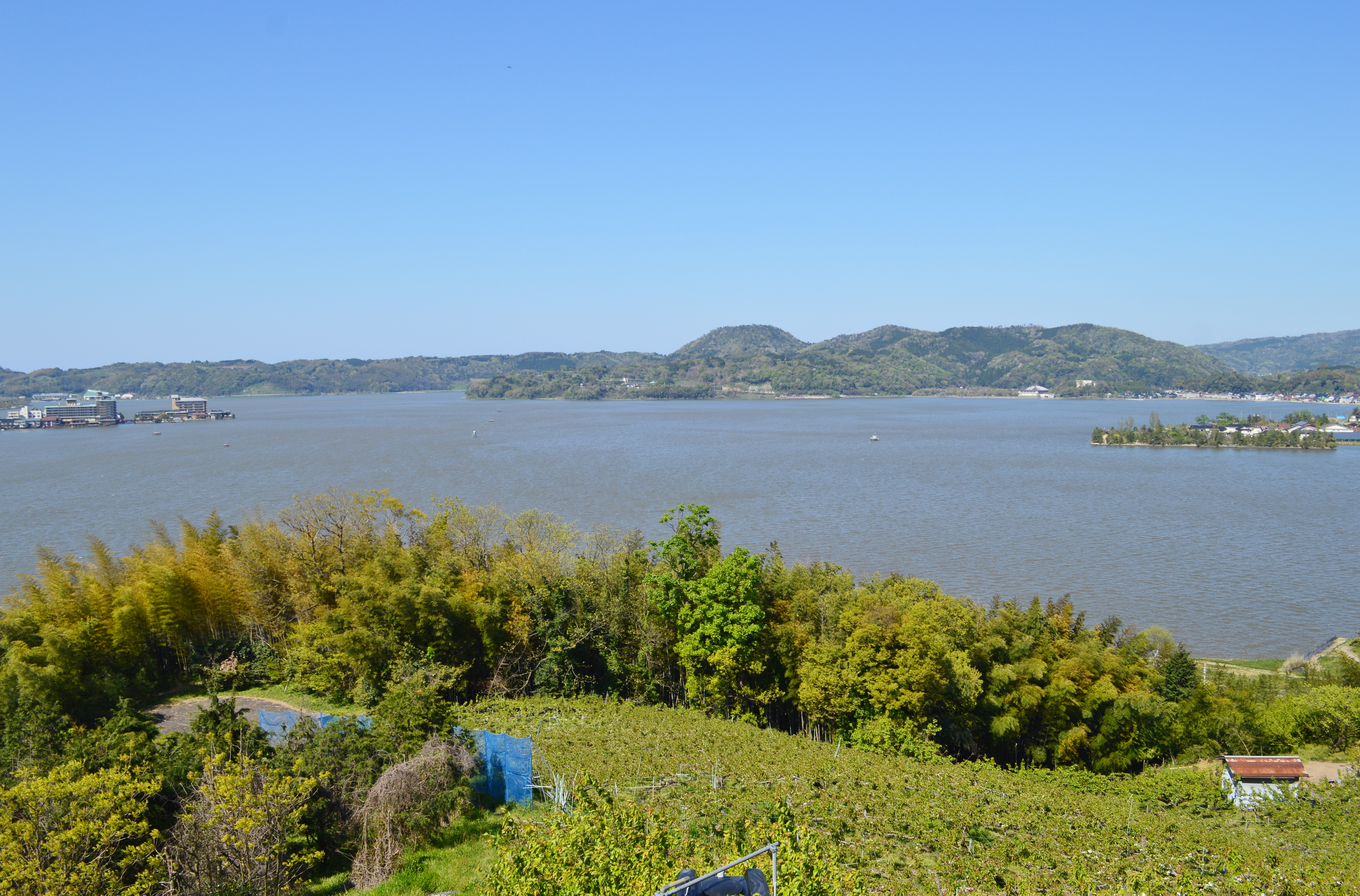 北山古墳から望む東郷池